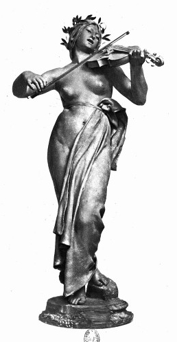 La Musique